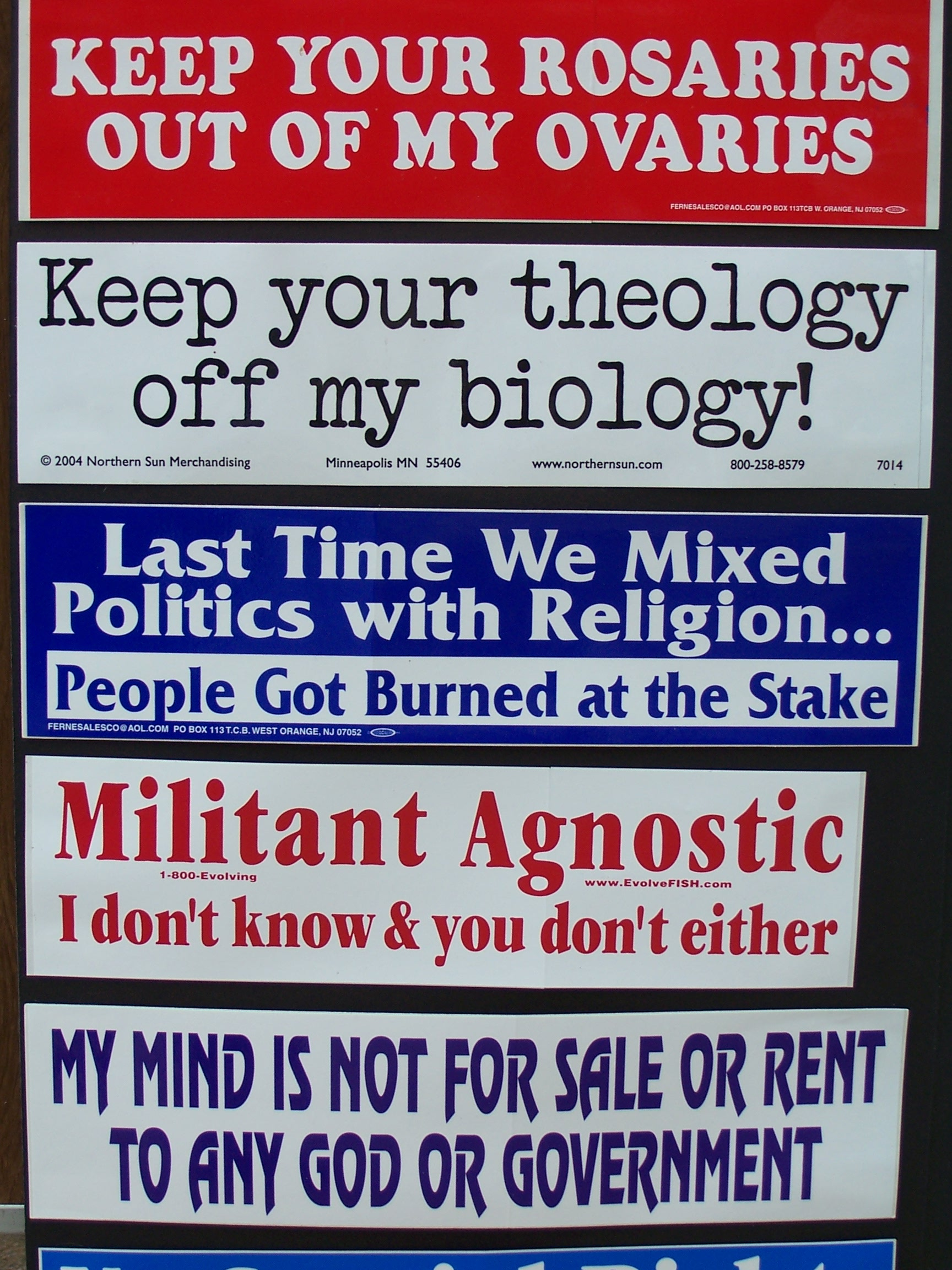 Atheist stickers.